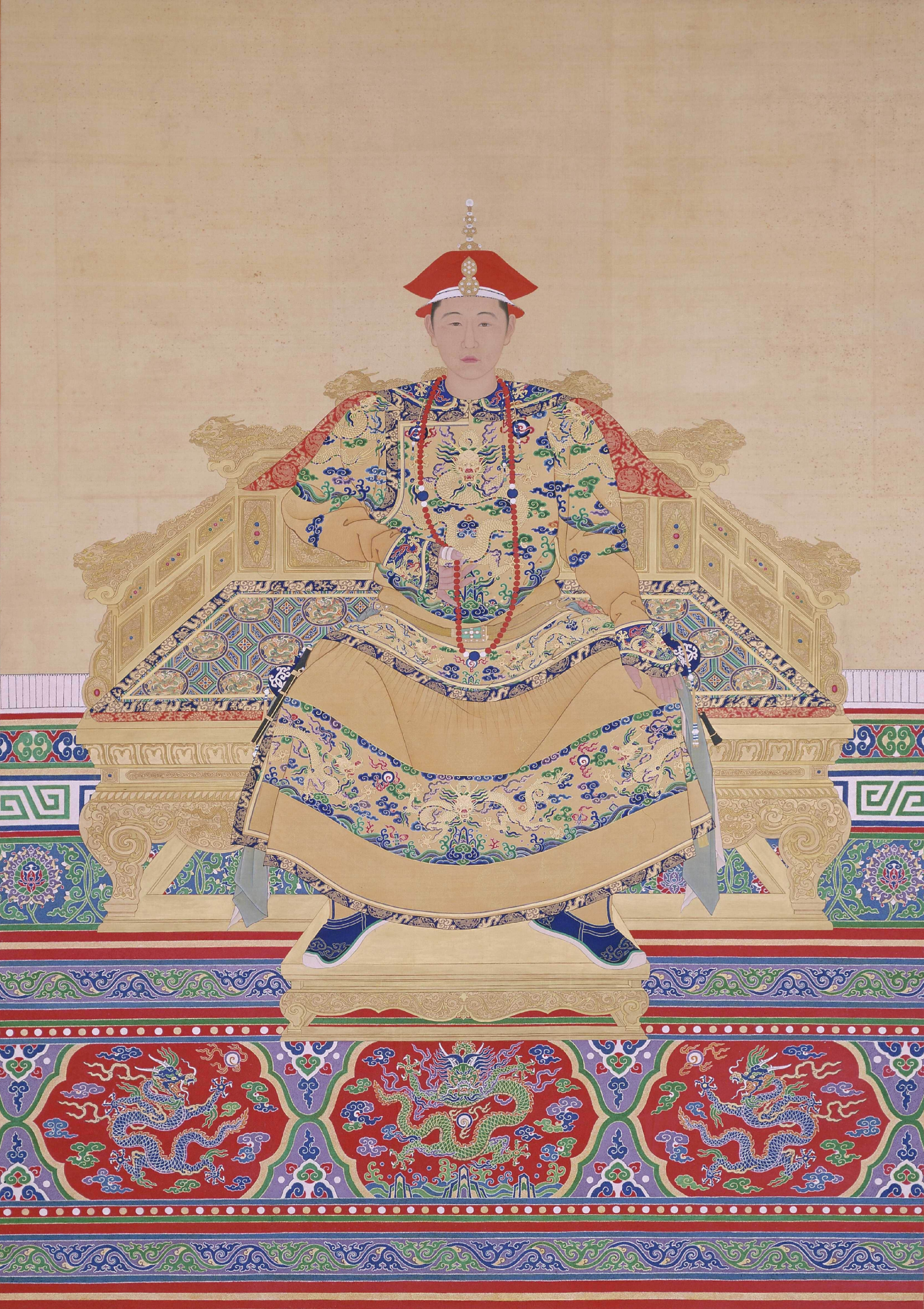 清世祖朝服像